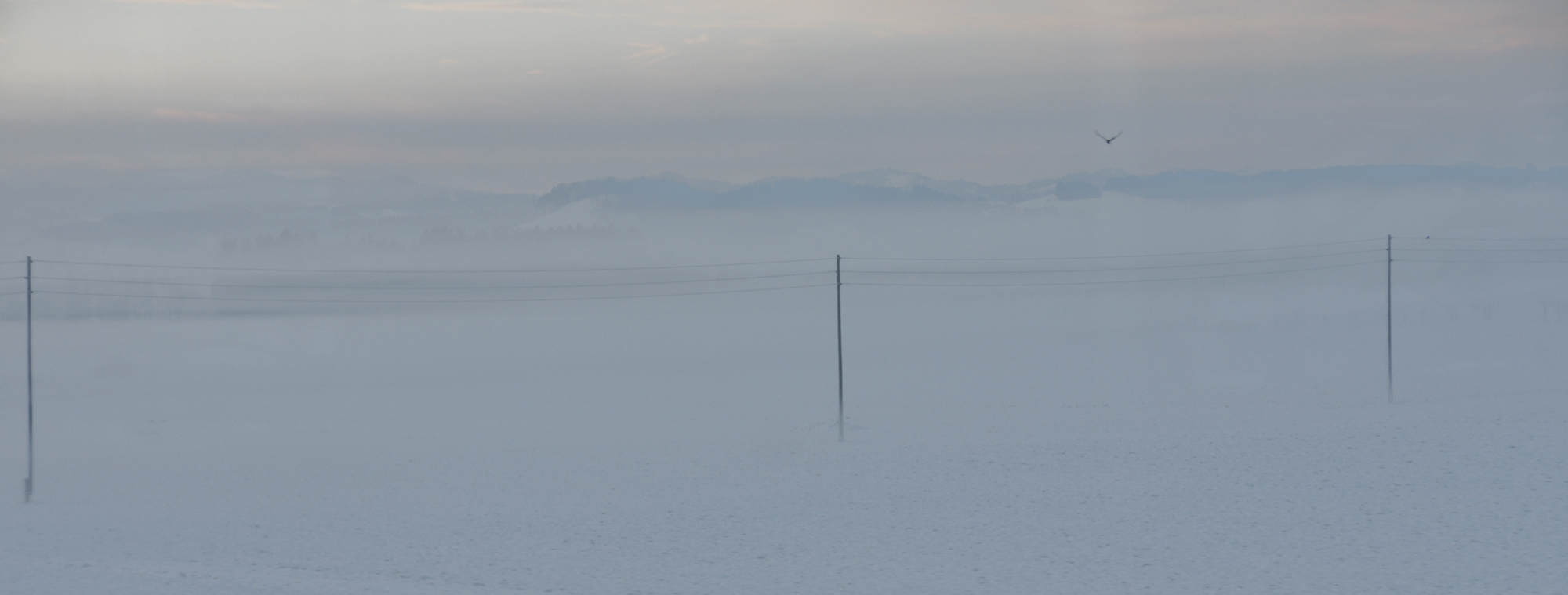 Wauwilermoor im Morgennebel vom Zug aus fotografiert